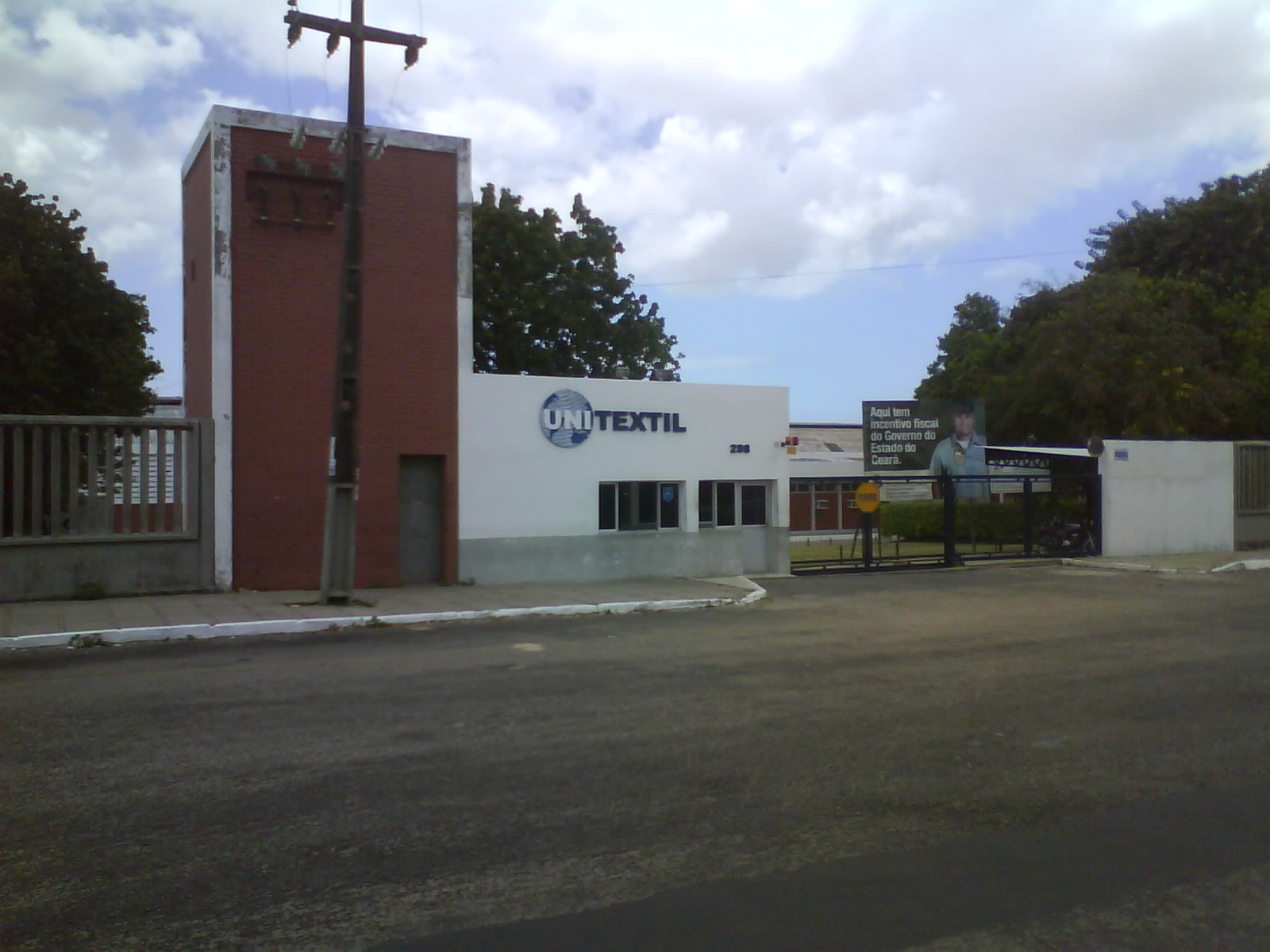 Fábrica Unitêxtil, na Avenida Audízio Pinheiro.